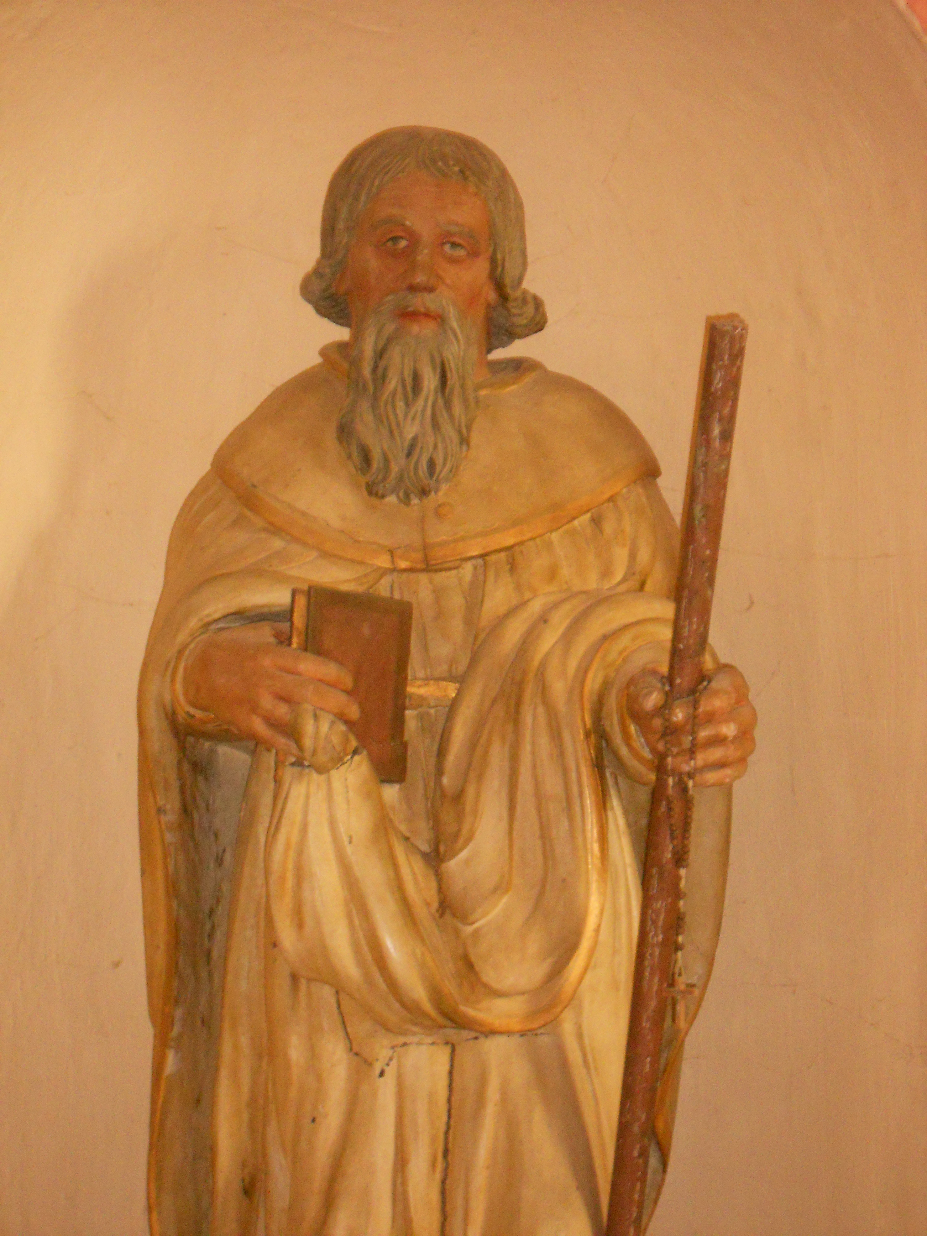 Statue de Saint Ortaire, Le Dezert, Normandie.